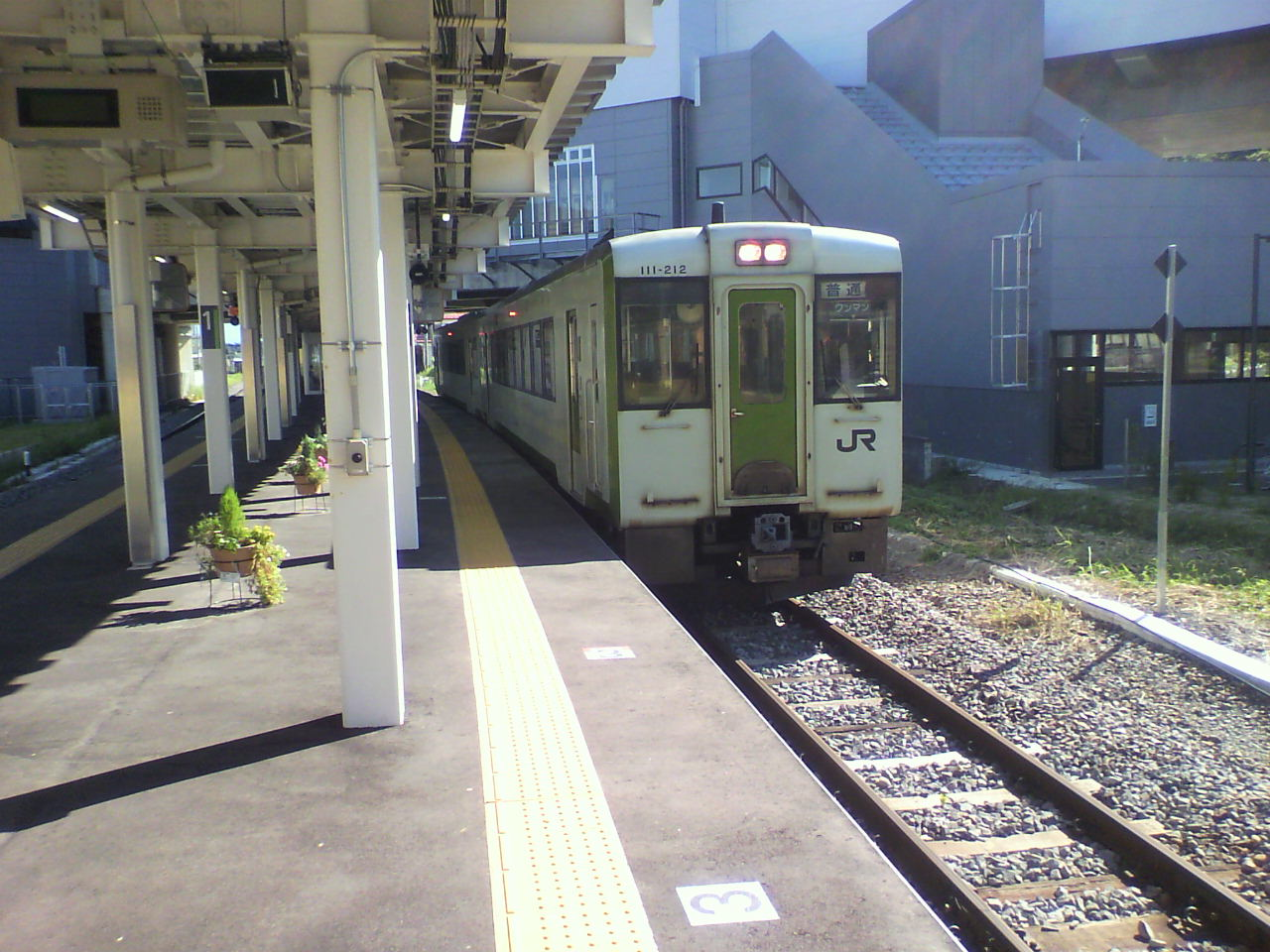 飯山駅に停車中の飯山線列車